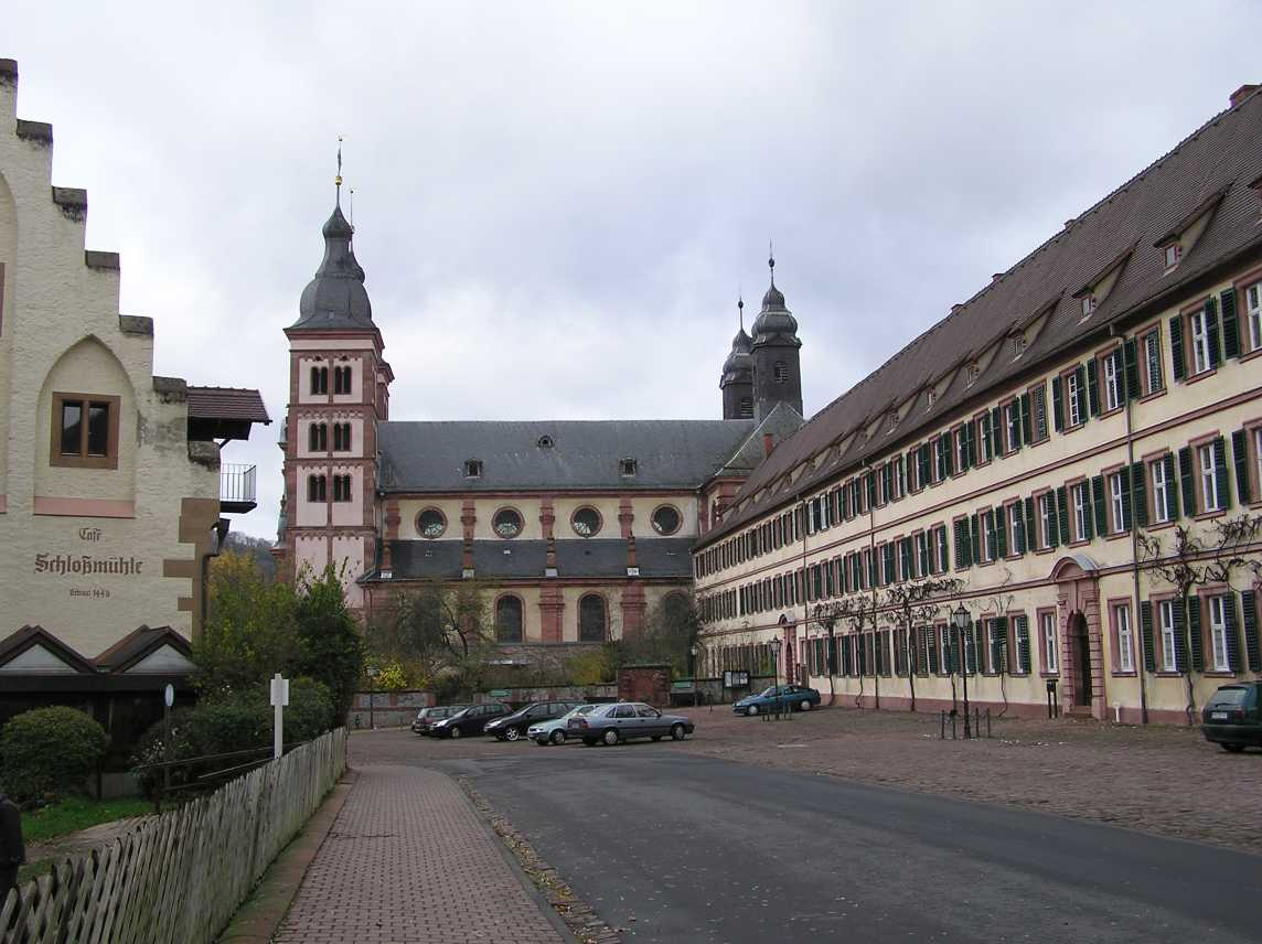 Kloster Amorbach